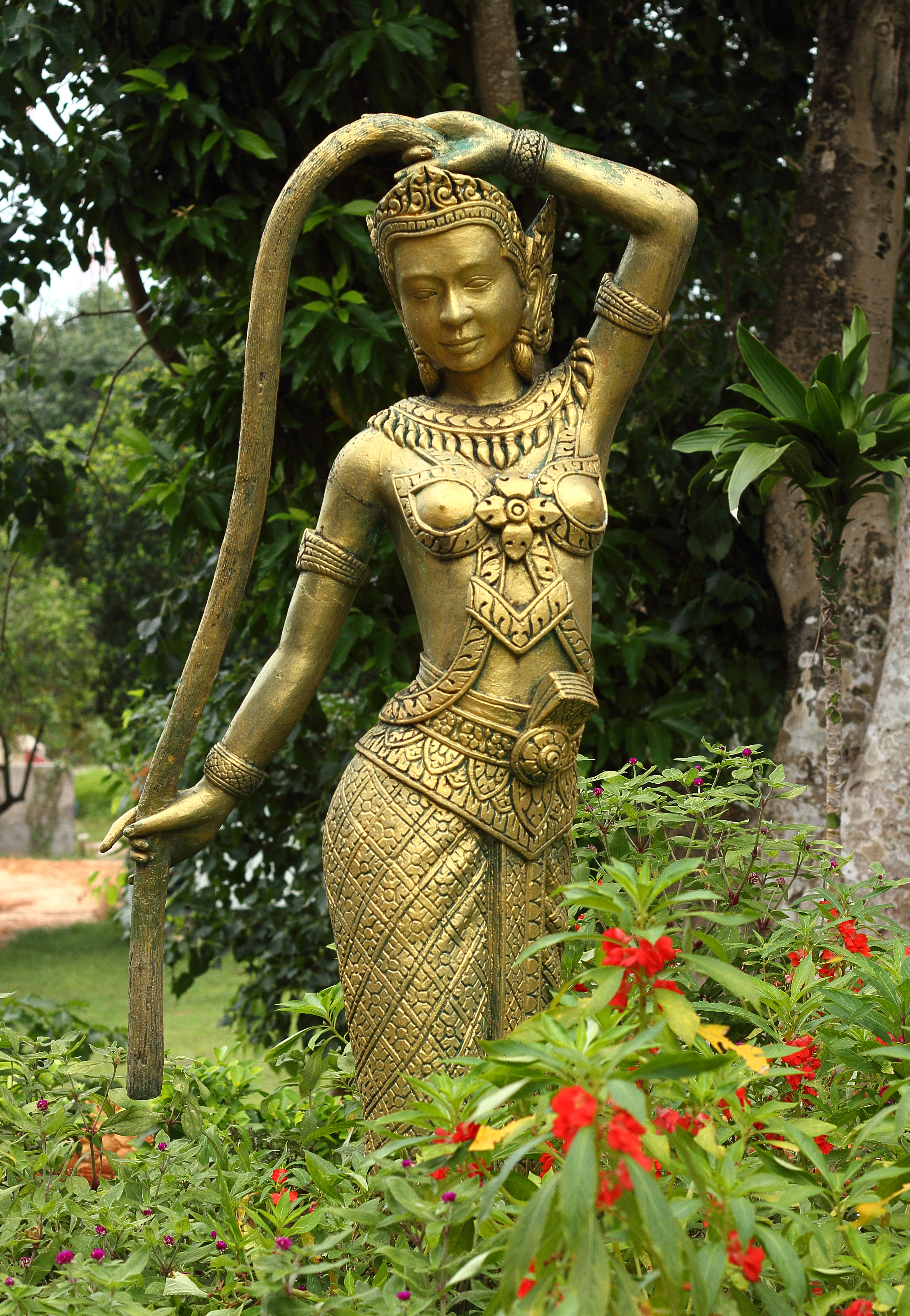 Буддийская богиня Ниин Кон Хинь Хоpни.